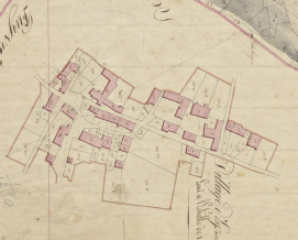 Esposolla en el Cadastre Napoleònic del 1812 (Arxius Departamentals dels Pirineus Orientals)